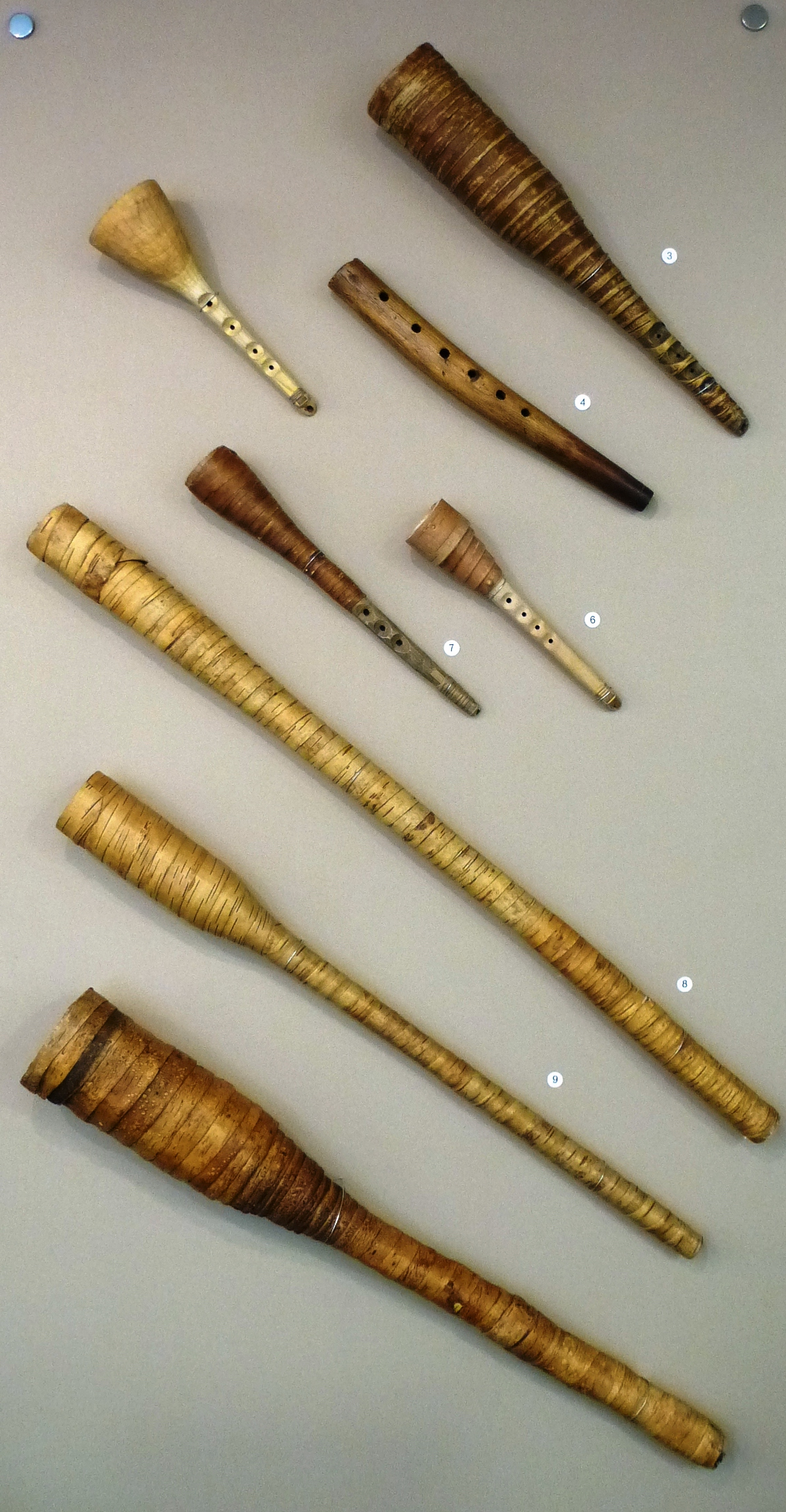 Образцы карельских пастушечьих рожков.(источник - Национальный музей Республики Карелия)